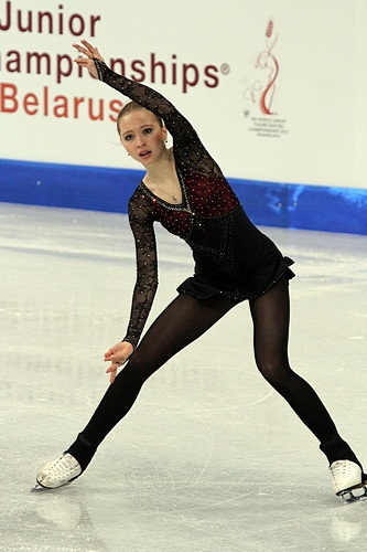 Полина Шелепень (Россия) на чемпионате мира по фигурному катанию 2012